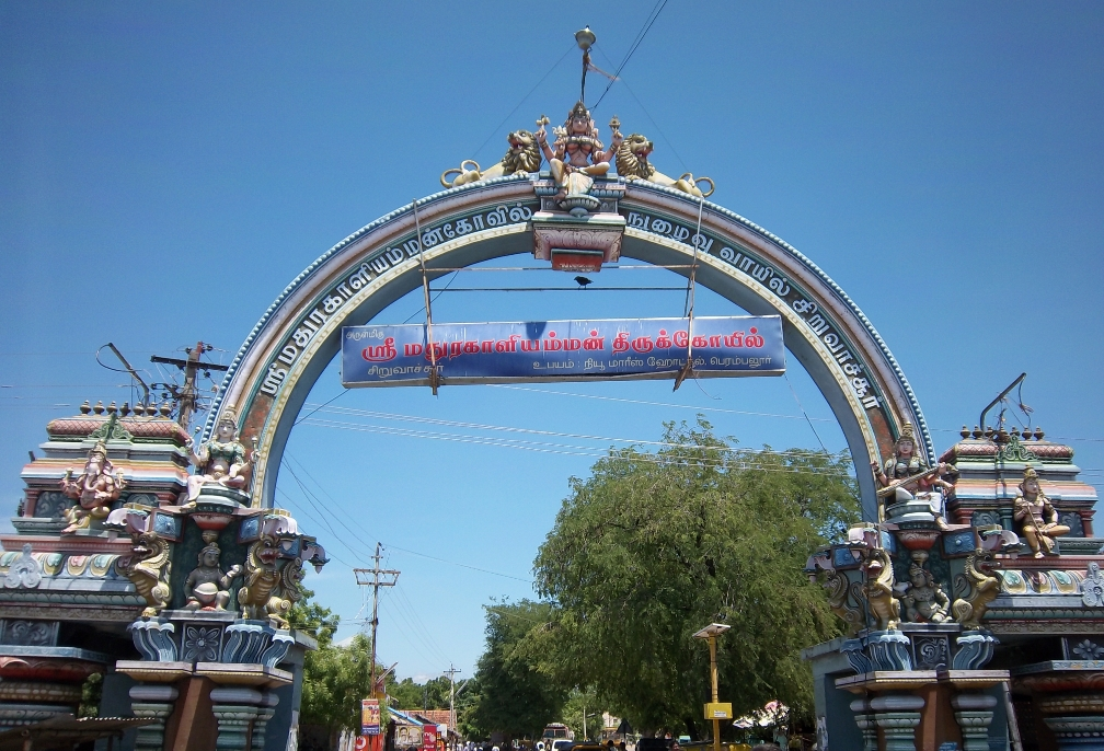 சிறுவாச்சூர் மதுரகாளியம்மன் கோவில்